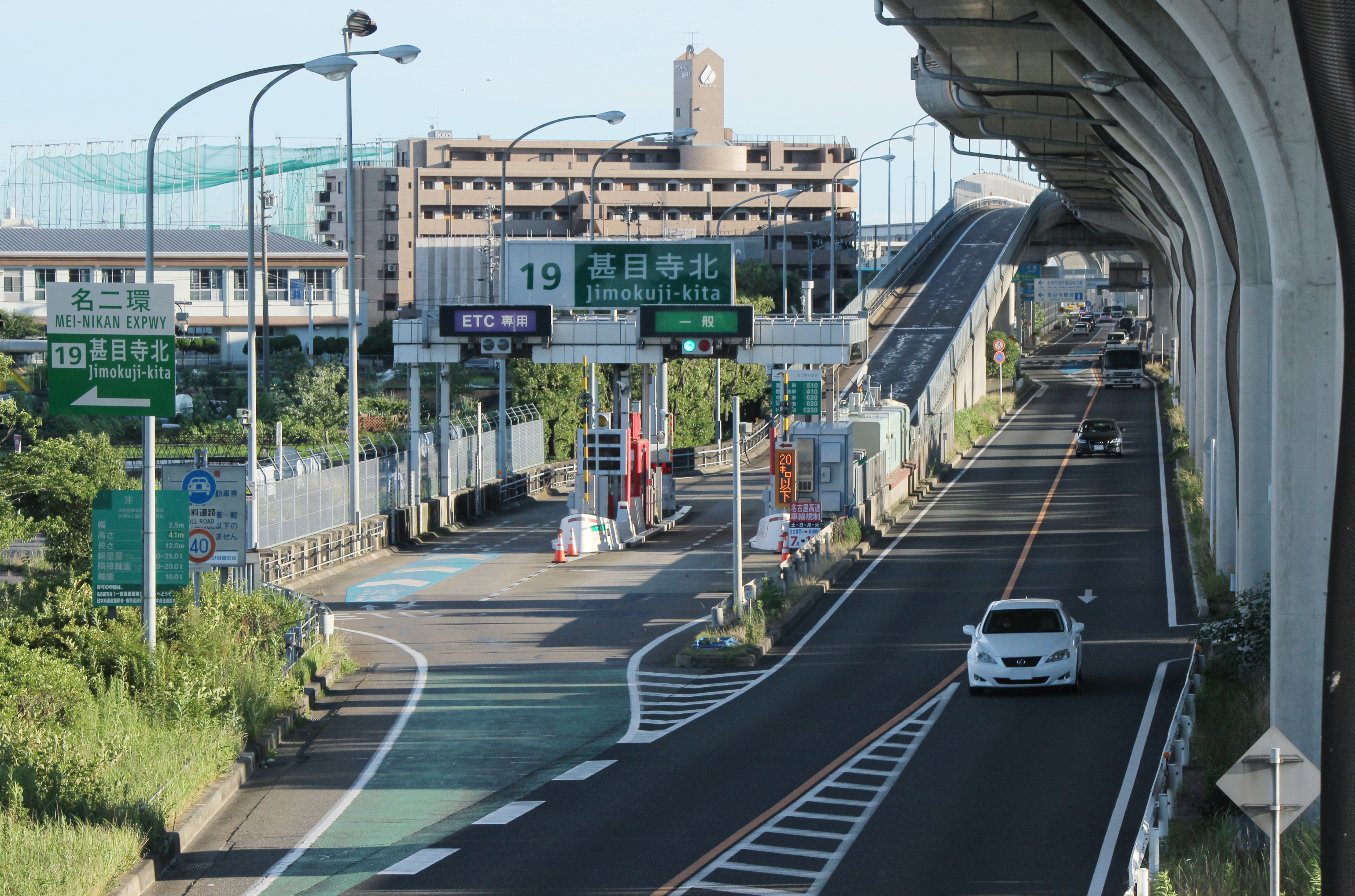 名二環 甚目寺北IC